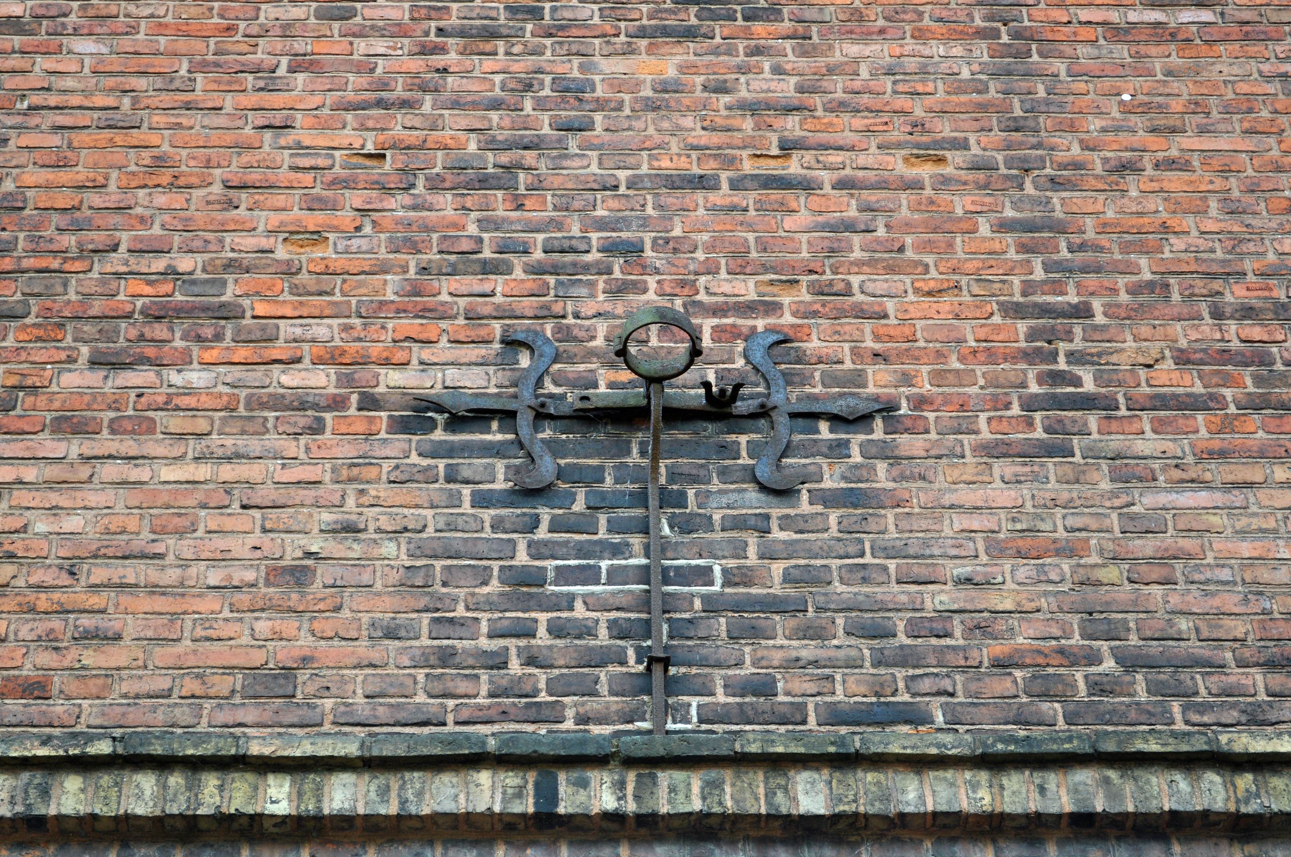 Gebäude in Stralsund, siehe Dateiname